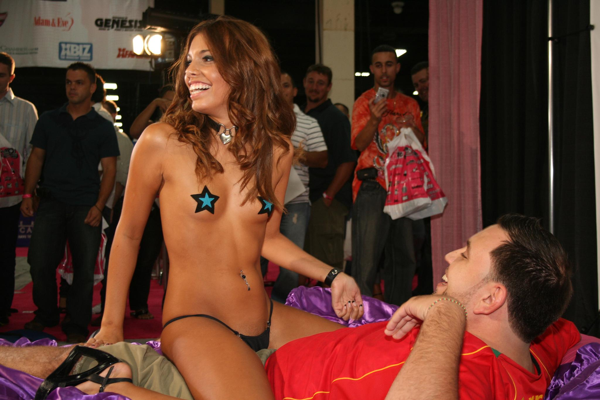 Morgan Dayne